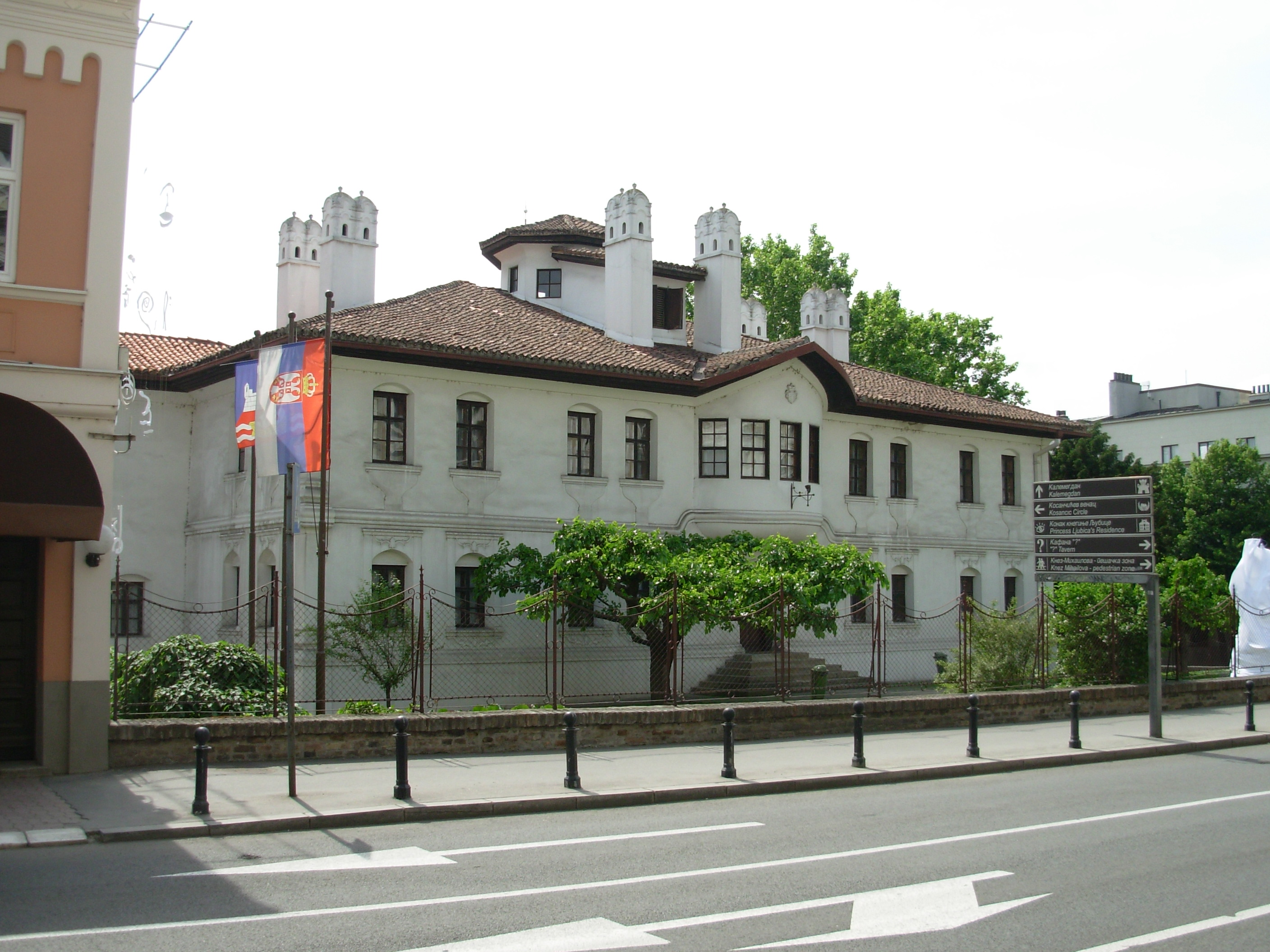 Конак књегиње Љубице из другог угла, Београд. Сликао Голдфингер